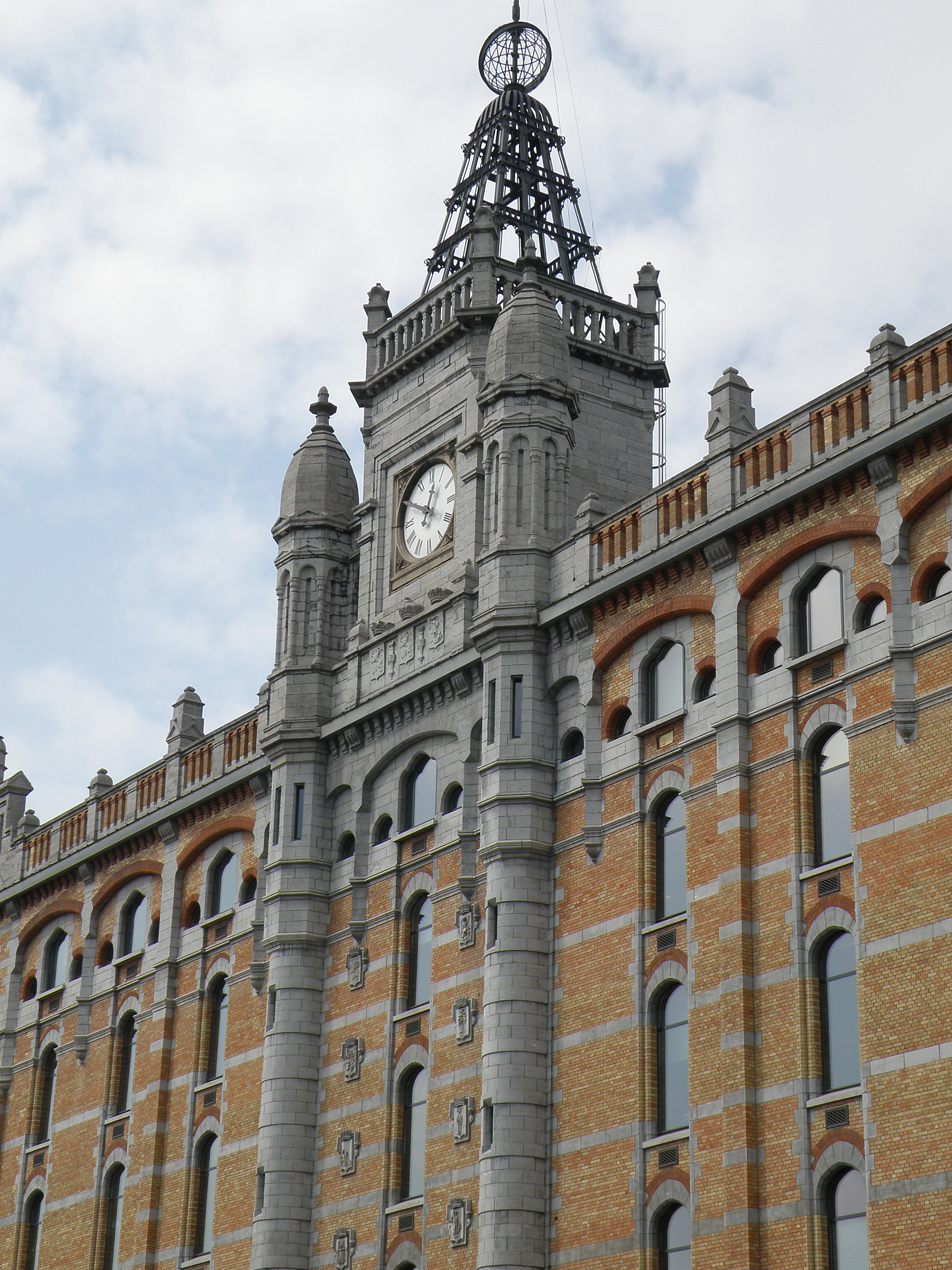 Bruxelles, Belgique. Site de Tour et Taxis (en néerl. Thurn en Taxis), situé avenue du Port, le long du canal de Bruxelles. Façade de l’Entrepôt royal, construit entre 1904 et 1907 selon les plans de l’architecte Ernest Van Humbeek. Travée centrale avec tour à horloge.